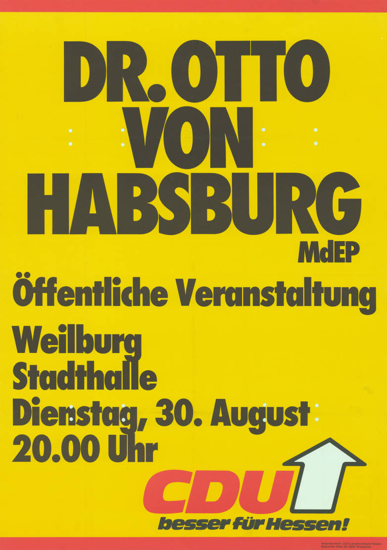 Dr. Otto von Habsburg MdEP Öffentliche Veranstaltung ... CDU besser für Hessen!Kommentar:Rückseitig mit Kugelschreiber beschriftet.Plakatart:AnkündigungsplakatAuftraggeber:Verantw.: CDU-Landesverband Hessen, WiesbadenObjekt-Signatur:10-007 : 641Bestand:Landtagswahlplakate Hessen (10-007)GliederungBestand10-18:Landtagswahlplakate Hessen (10-007) » CDULizenz:KAS/ACDP 10-007 : 641 CC-BY-SA 3.0 DE